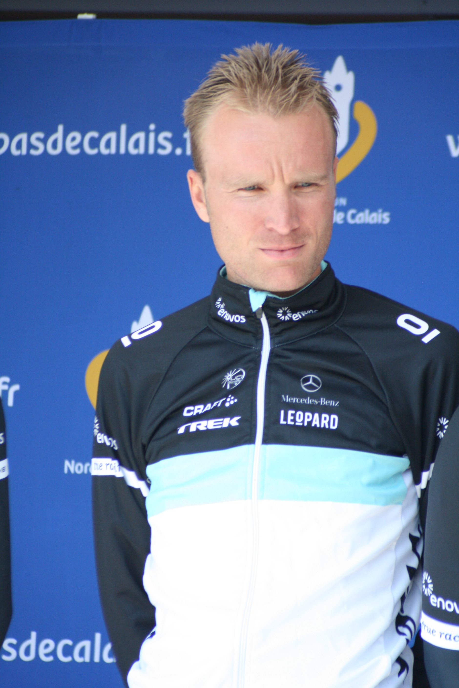 Présentation des coureurs au départ de la première étape Joost Posthuma